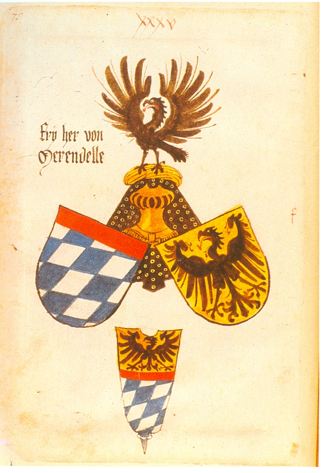 Ingeram-Codex der ehemaligen Bibliothek Cotta XXXV fry her von/Merendelle (Gesamtwappen auf zwei Schilde aufgeteilt, für Giovanni Francesco Pico della Mirandola, +1467)